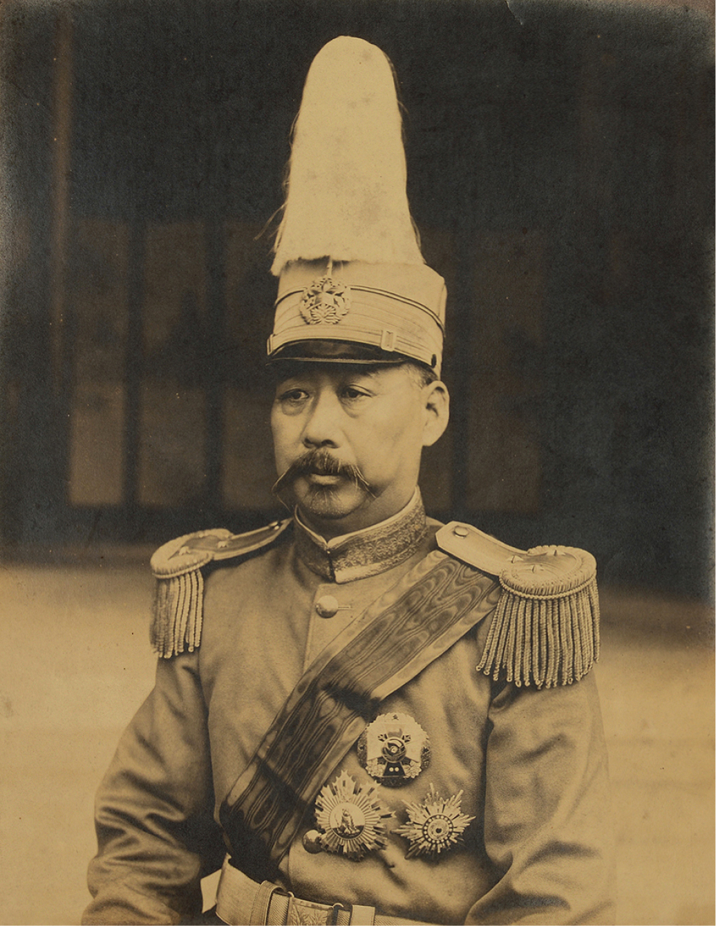 东方杂志第二十二卷第三号上刊登的《东南问题之再燃》中的卢永祥照片